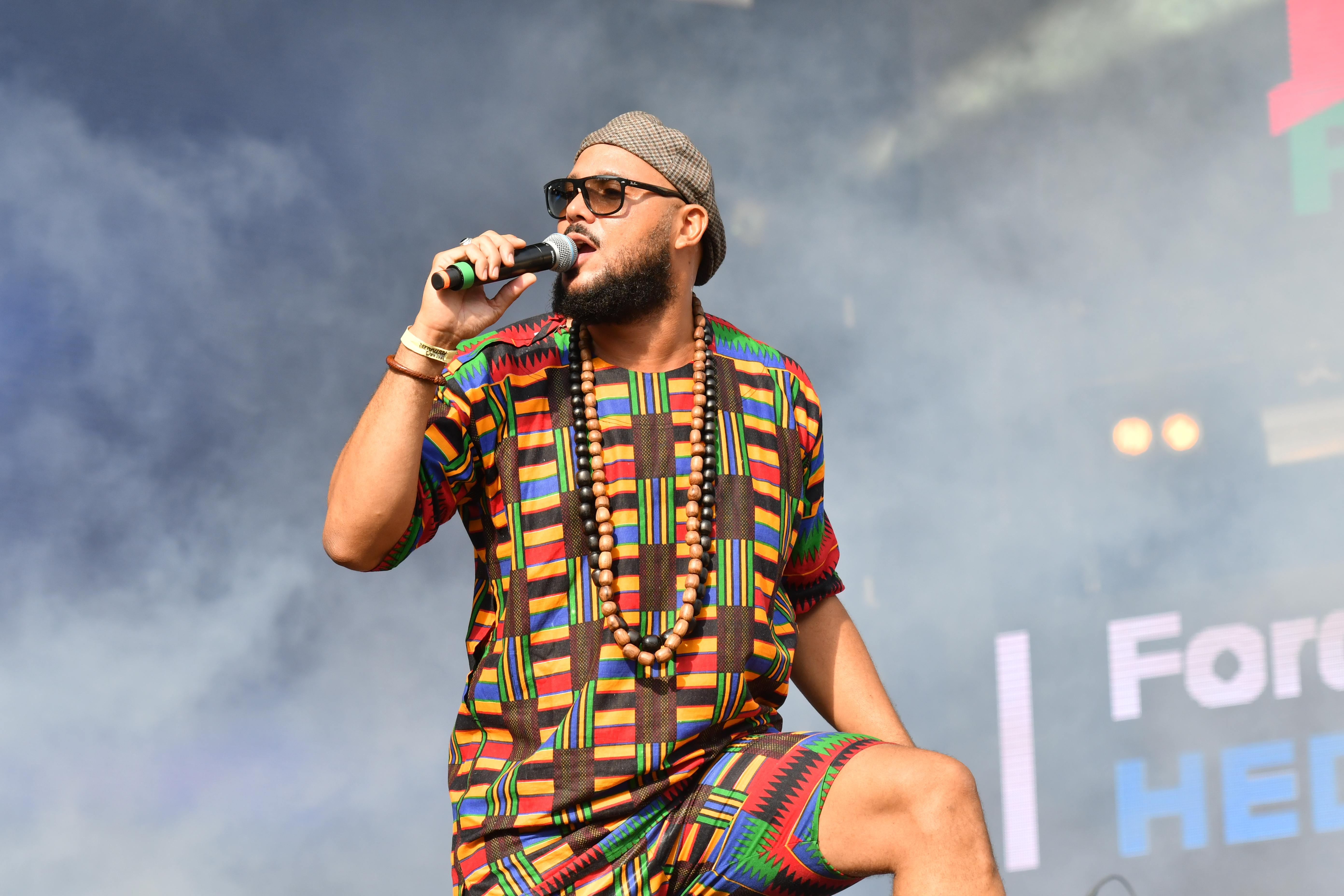 Kaliffa på Malmöfestivalen 2018.